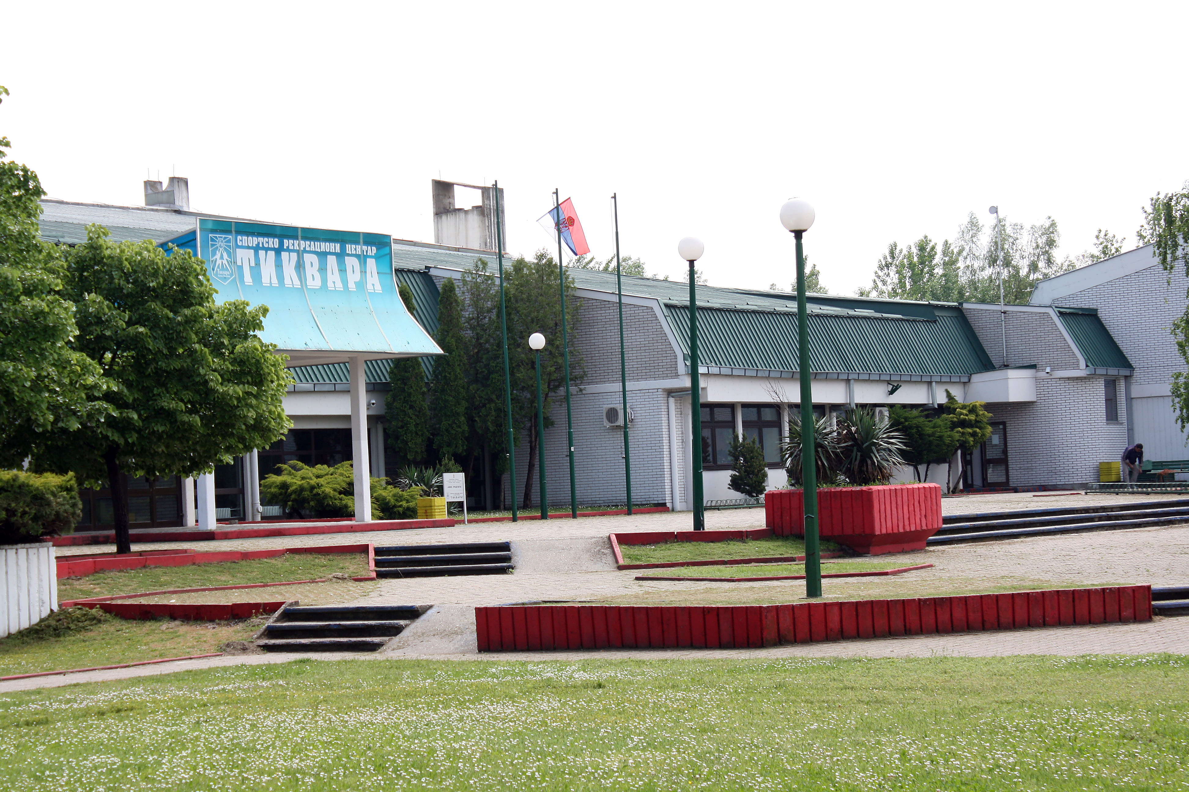 Спортско рекреациони центар у Бачкој Паланци, Србија.